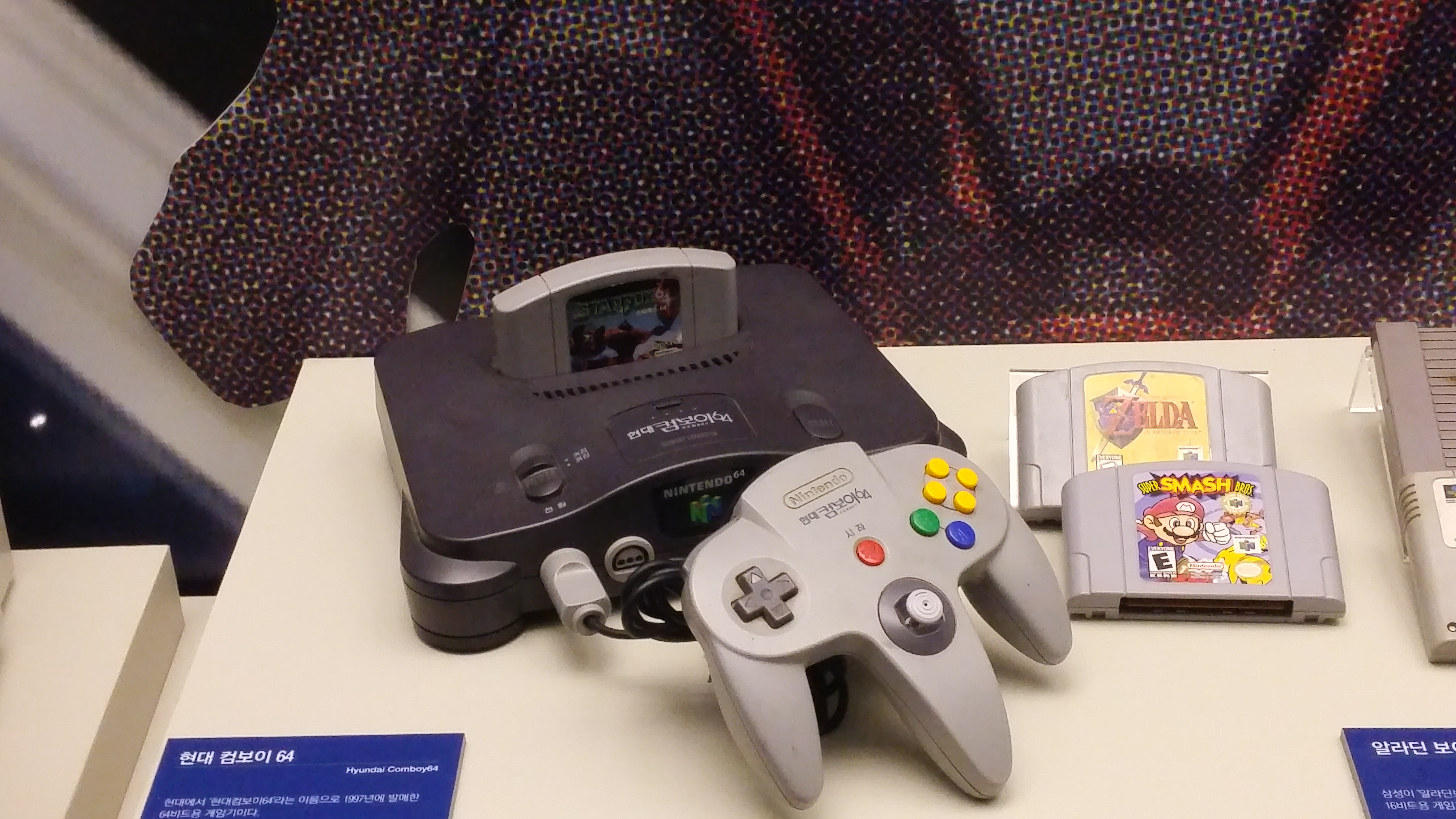 Hyundai Comboy 64, Lizensiert von Nintendo. Aufnahme im Seoul Museum of History.